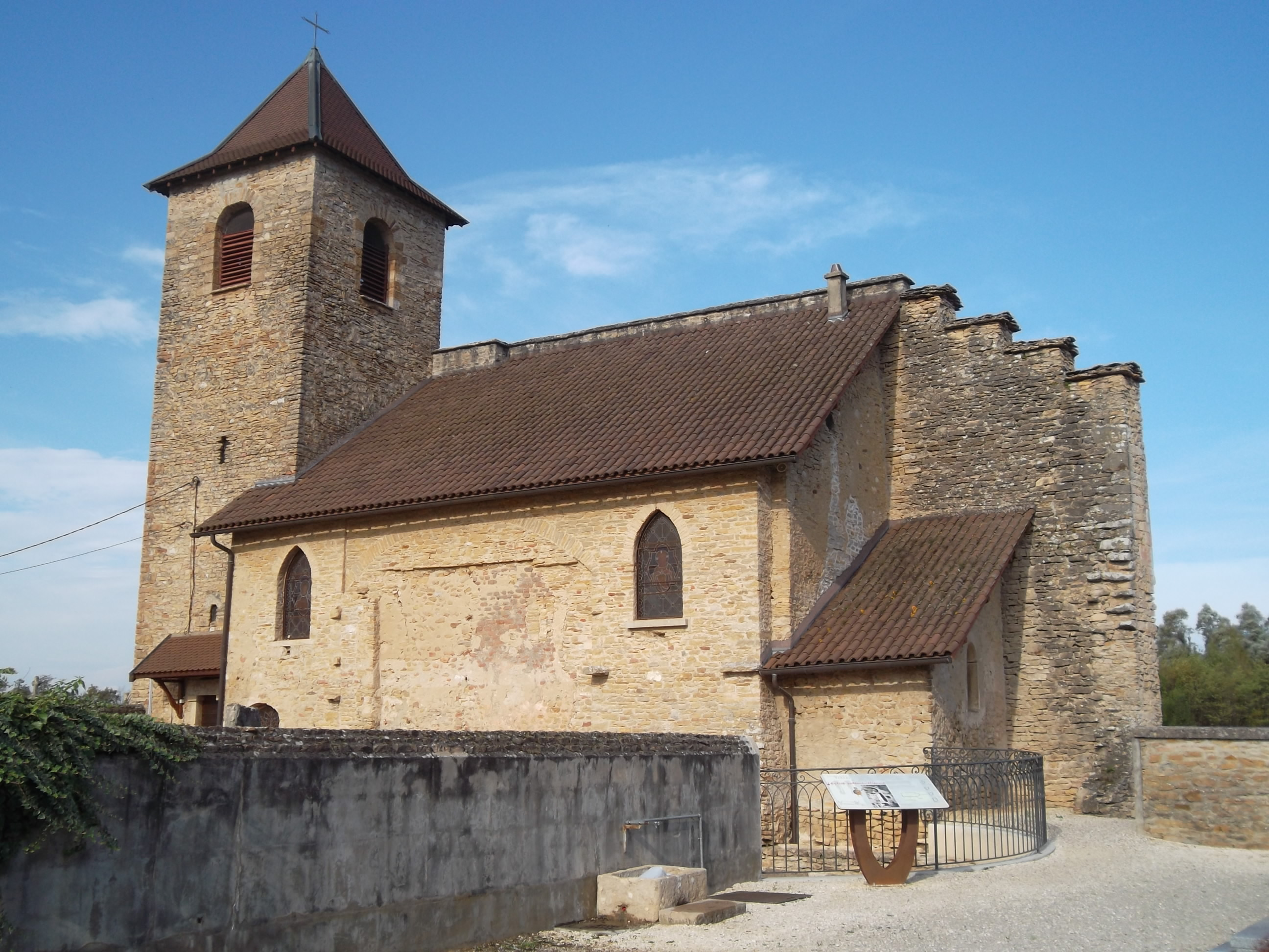 Eglise paroissiale Saint-Romain (anciennement Notre-Dame) à Saint-Romain-de-Jalionas.